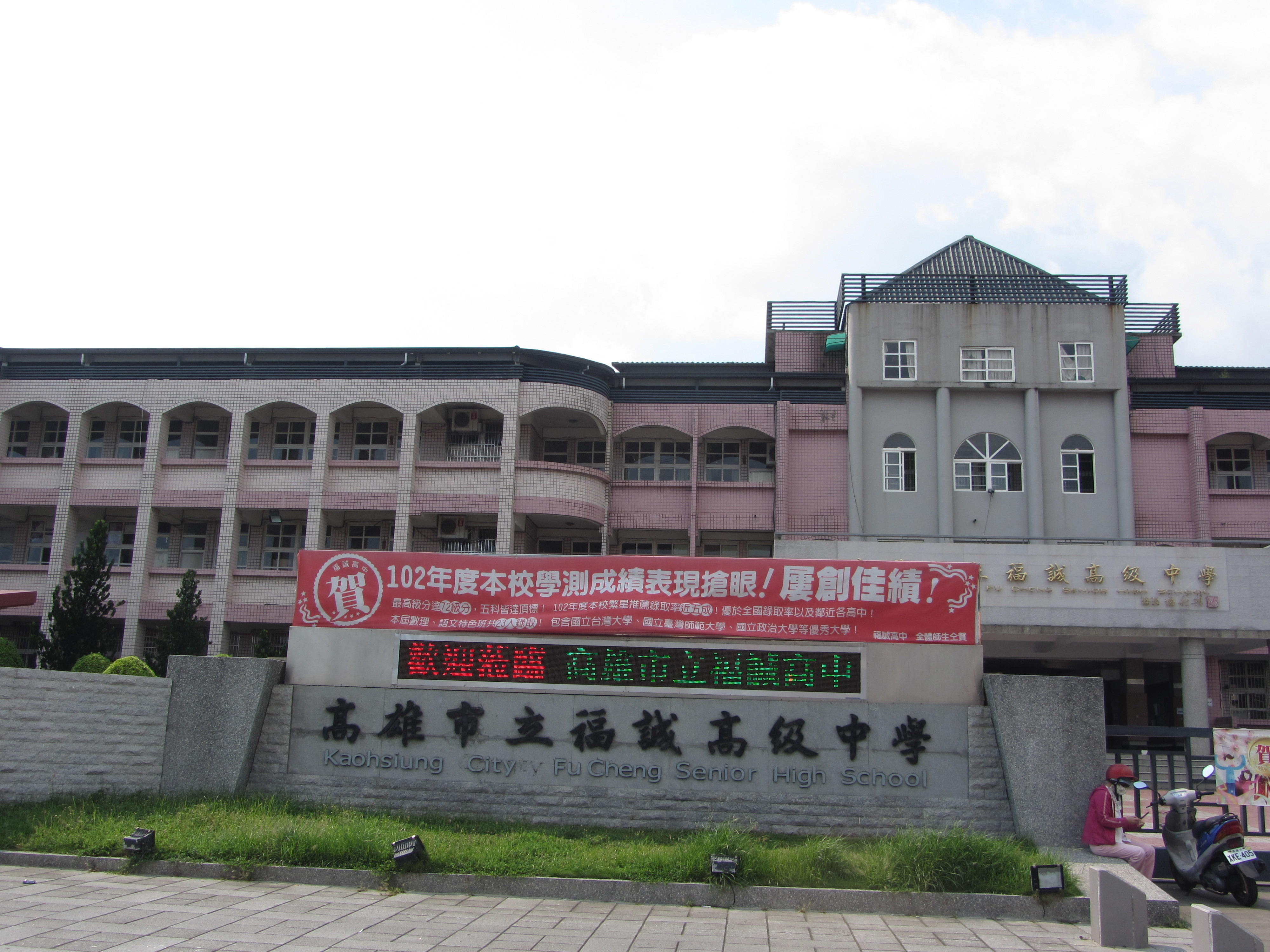 高雄市立福誠高級中學校門